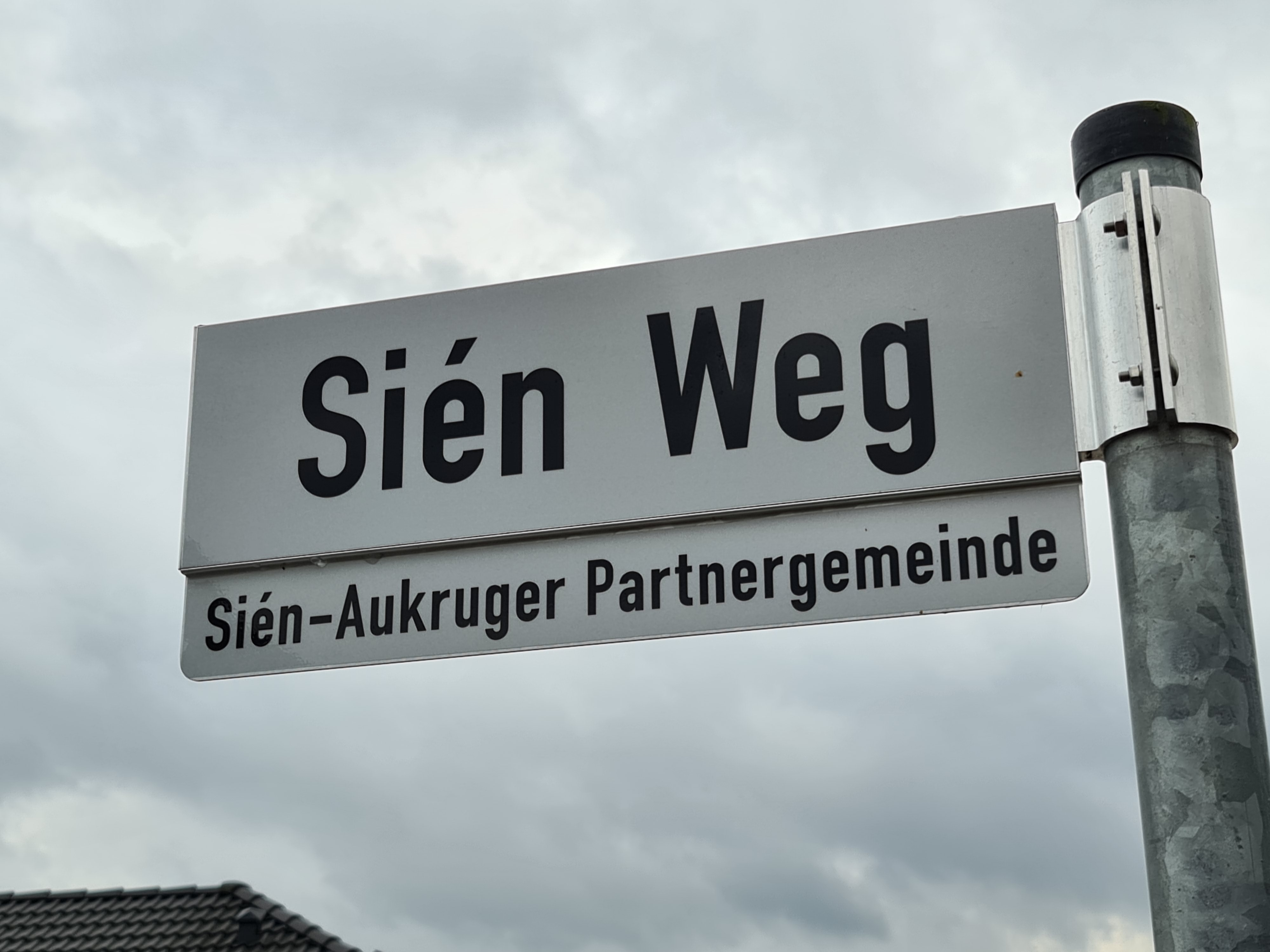 Der Sièn Weg in Aukrug